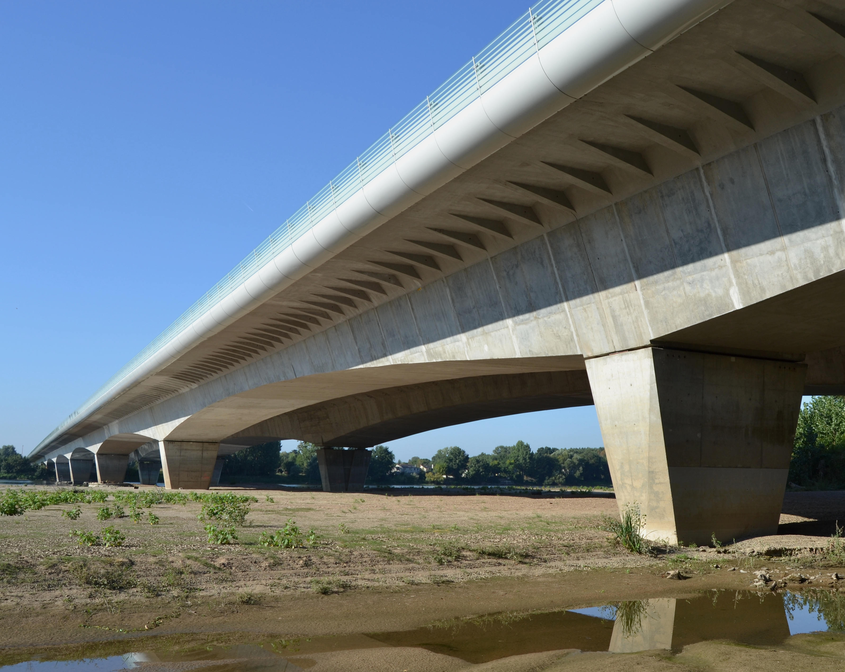 Viaduc de la Loire - Les Ponts-de-Cé